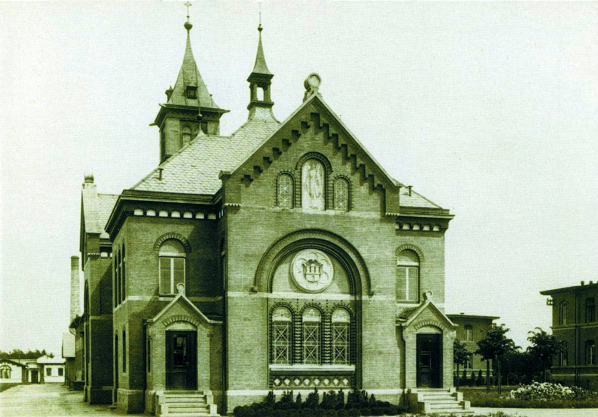 Foto von 1901. Ehemaligen Kapelle (oder Kirche, bzw. Haus 46 der ehemaligen Irrenanstalt Langenhorn (Krankenhaus Ochsenzoll), Haus für Gottesdienst und gesellige Veranstaltungen